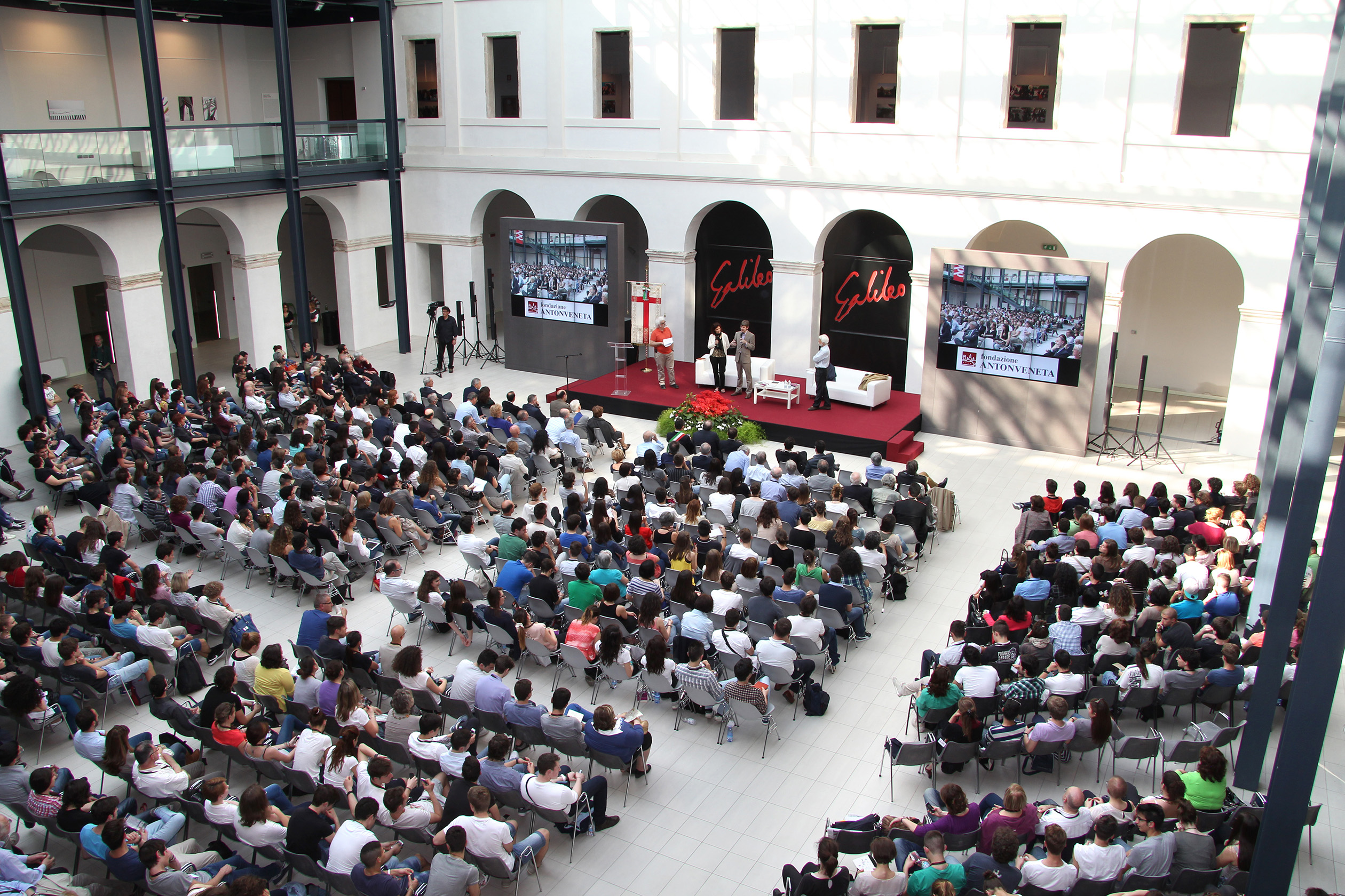 foto della cerimonia di premiazione dell'edizione 2013 del Premio letterario Galileo per la divulgazione scientifica, nel Centro culturale Altinate. Sul palco, alla destra nella fotgrafia, il fisico Paco Lanciano, presidente della commissione nel 2013